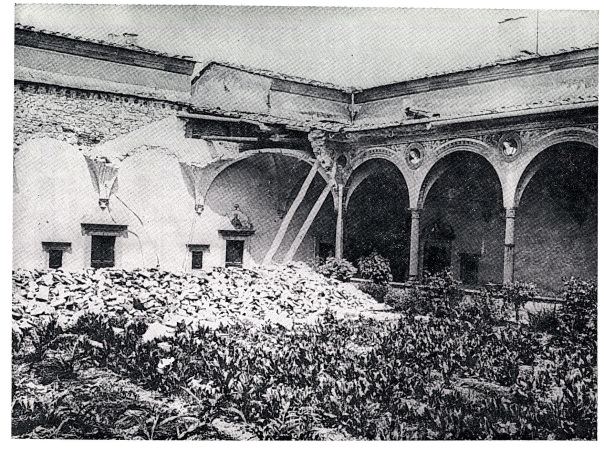 Crolli nel Chiostro Grande della Certosa del Galluzzo dopo il terremoto di Firenze del 1895